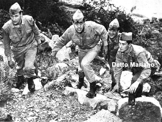 Detto Mariano - Adriano Celentano militari